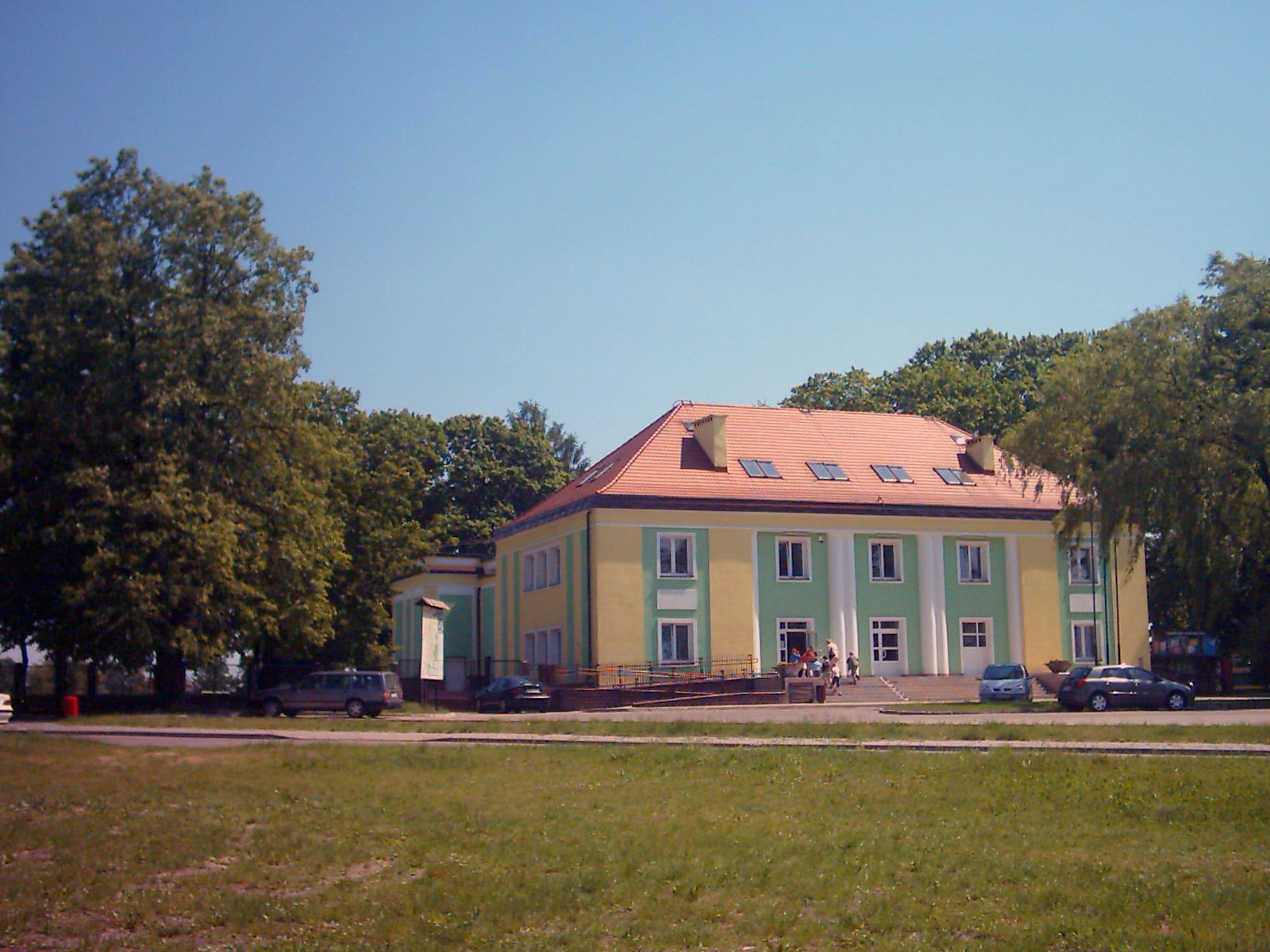 Dom Kultury w Hajnówce